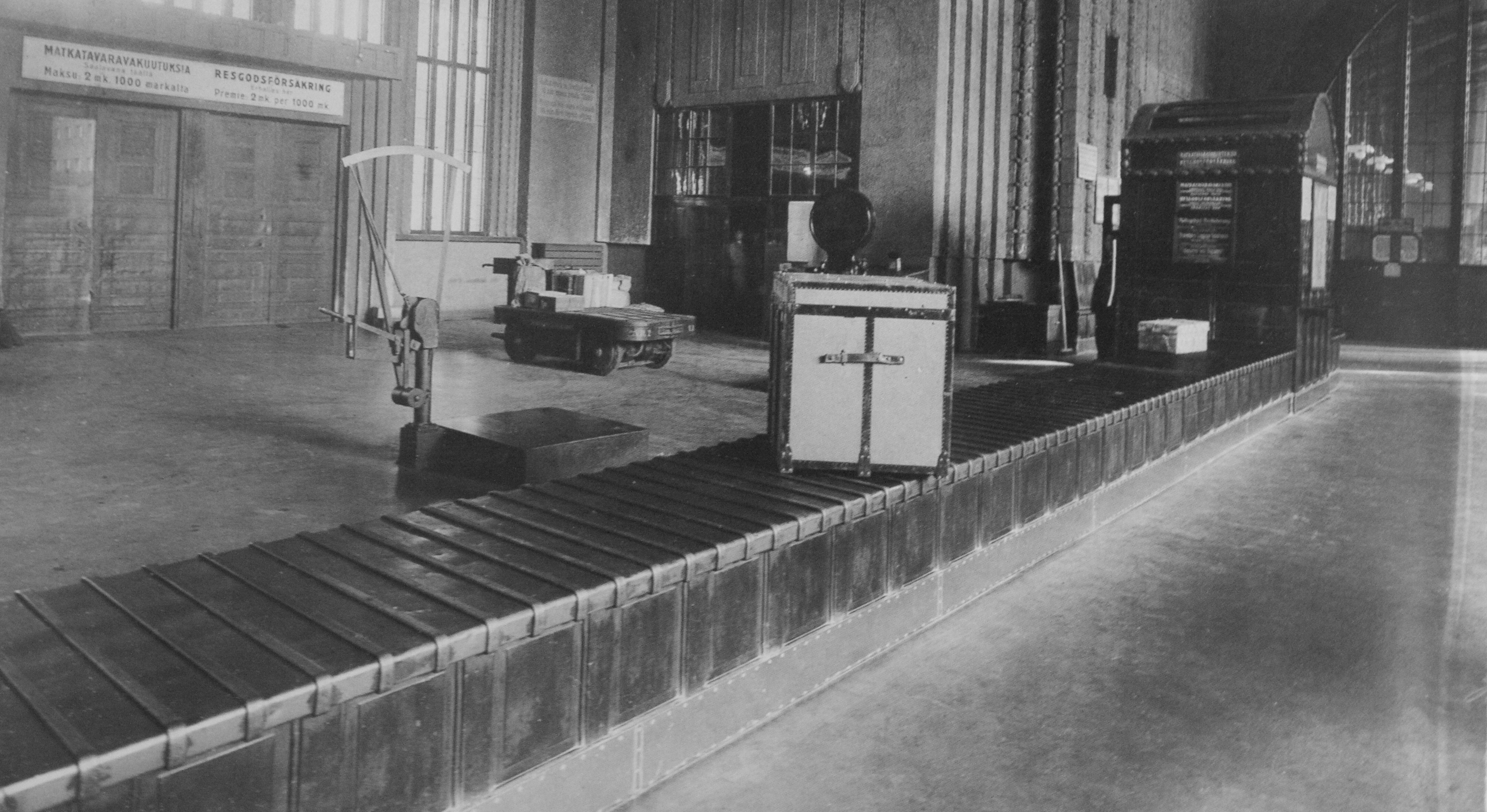 Matkatavaroiden luovutuspiste keskushallissa. 1928.